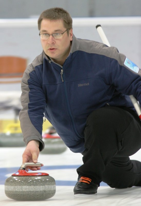 Jussi Uusipaavalniemi